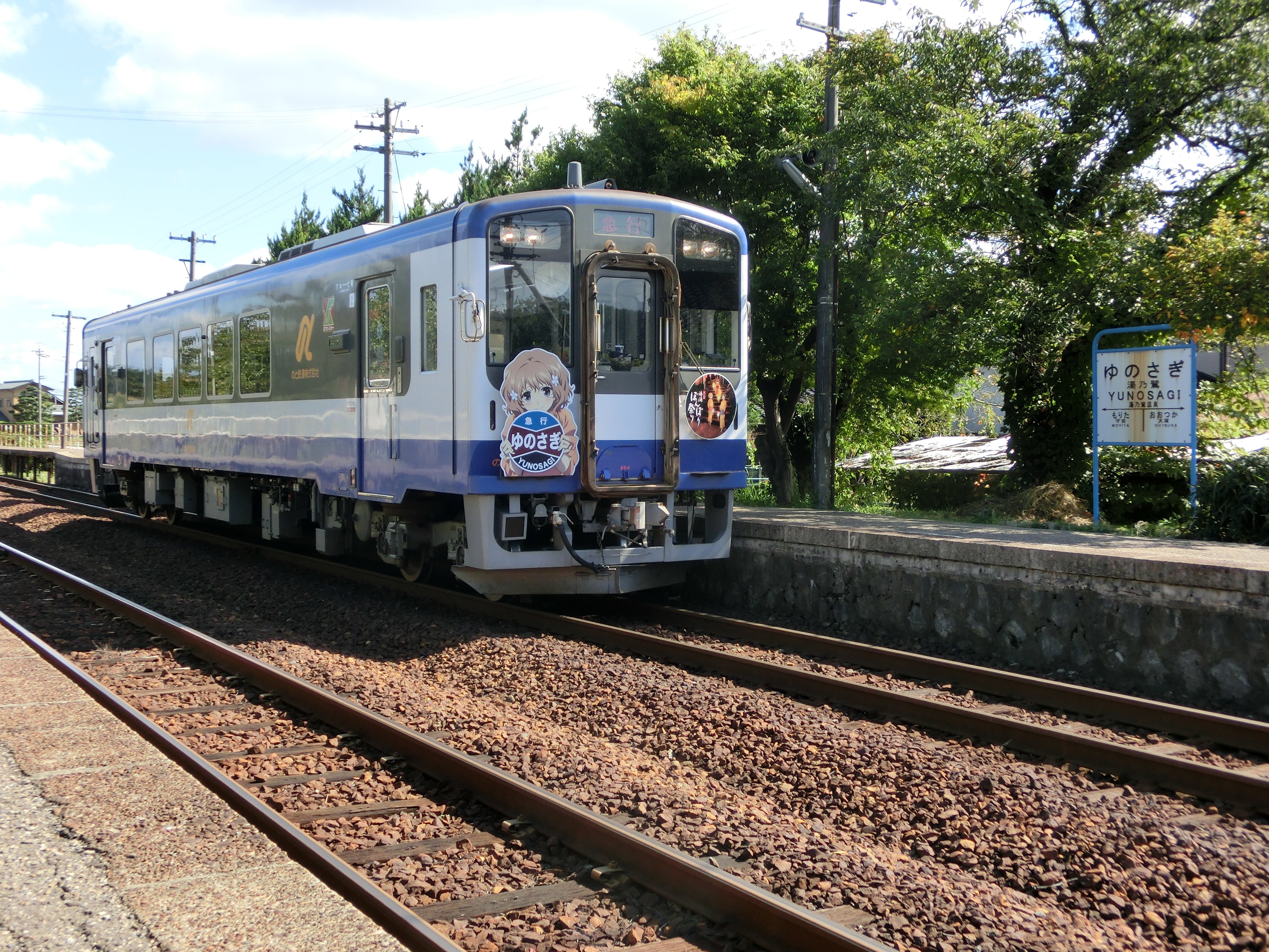 のと鉄道NT200形気動車のNT204号車で運用される、貸切列車「急行ゆのさぎ」。西岸駅にて、「湯乃鷺」の駅名標と同時に撮影。